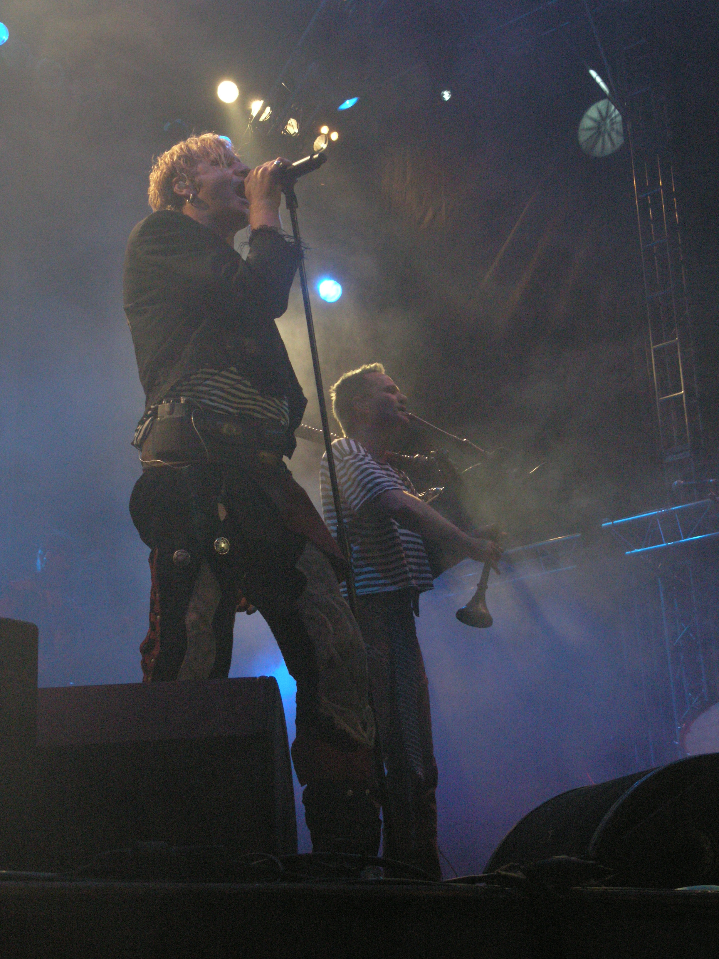 Zespół In Extremo w czasie festiwalu Masters of Rock 2007